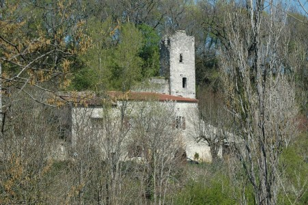 monument historique de st antoine